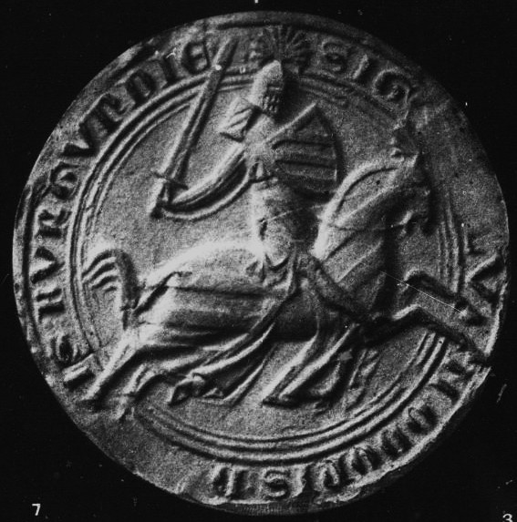 Eudes IV de Bourgogne